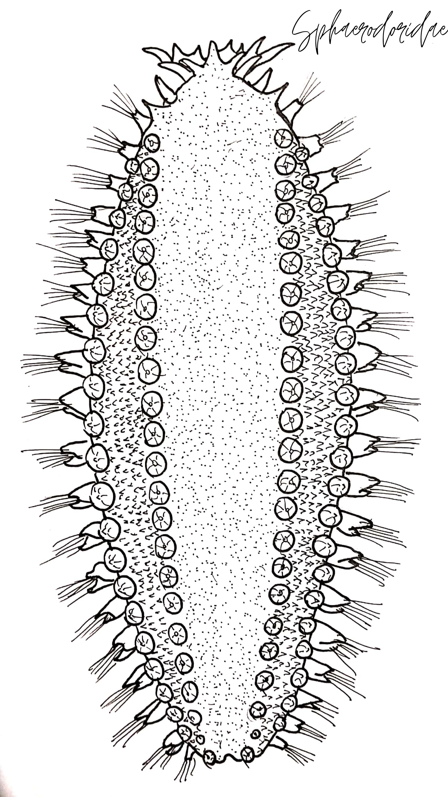 Representação da espécie Sphaerephesia sp. de Sphaerodoridae, baseada na obra Fauna of Australia, volume 4A, Polychaetes & Allies The Southern Synthesis.